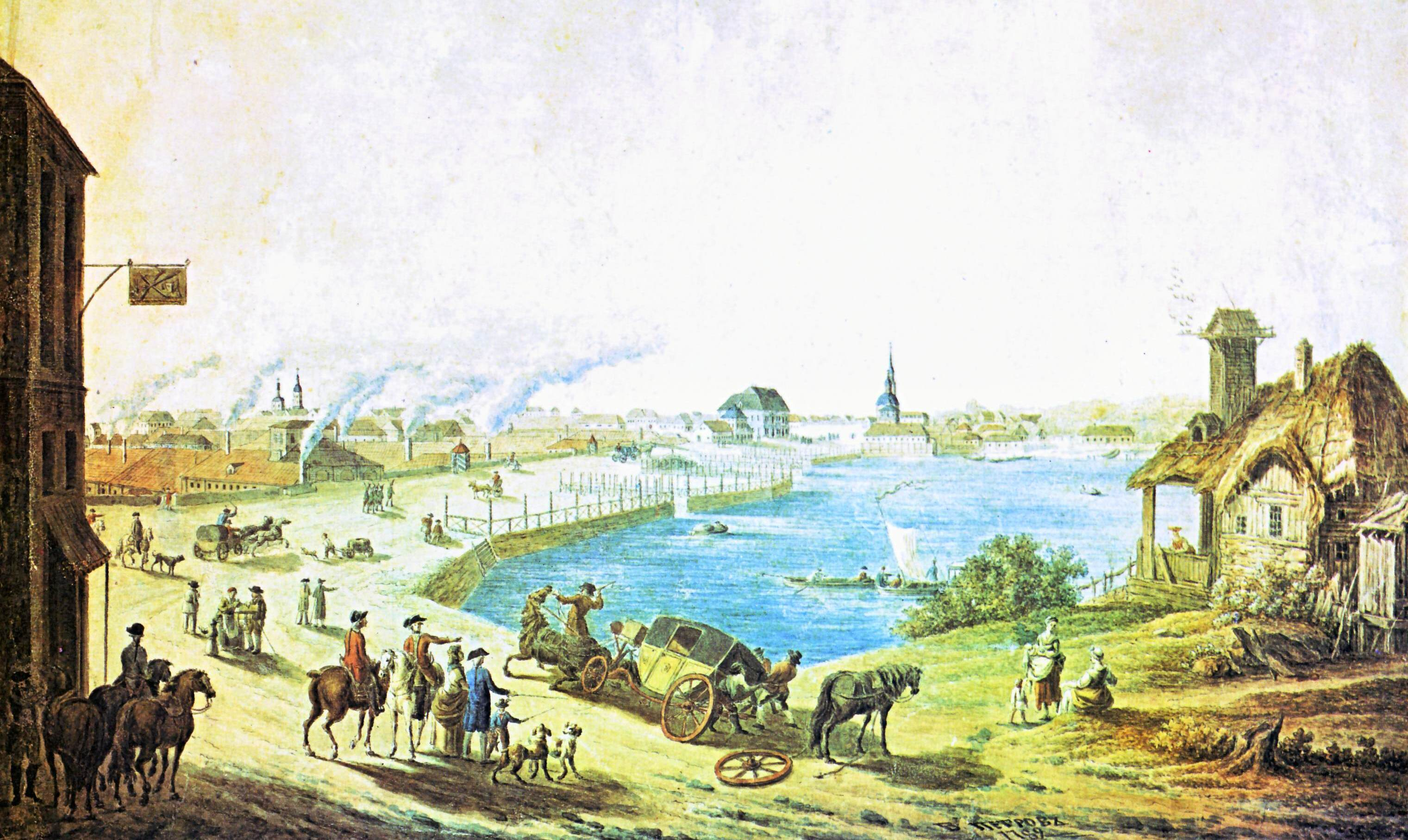 View of Yekaterinburg in 1789; russian: Вид Екатеринбурга в 1789. На картине видна Большая Першпективная дорога, проходящая через плотину Екатеринбургского завода (ныне Проспект Ленина), на горизонте выделяются здания церкви Малый Златоуст (слева, 1755-1768 годы постройки), Канцелярии горного правления (в центре, 1737-1739), Кафедрального собора( справа, 1771-1774)